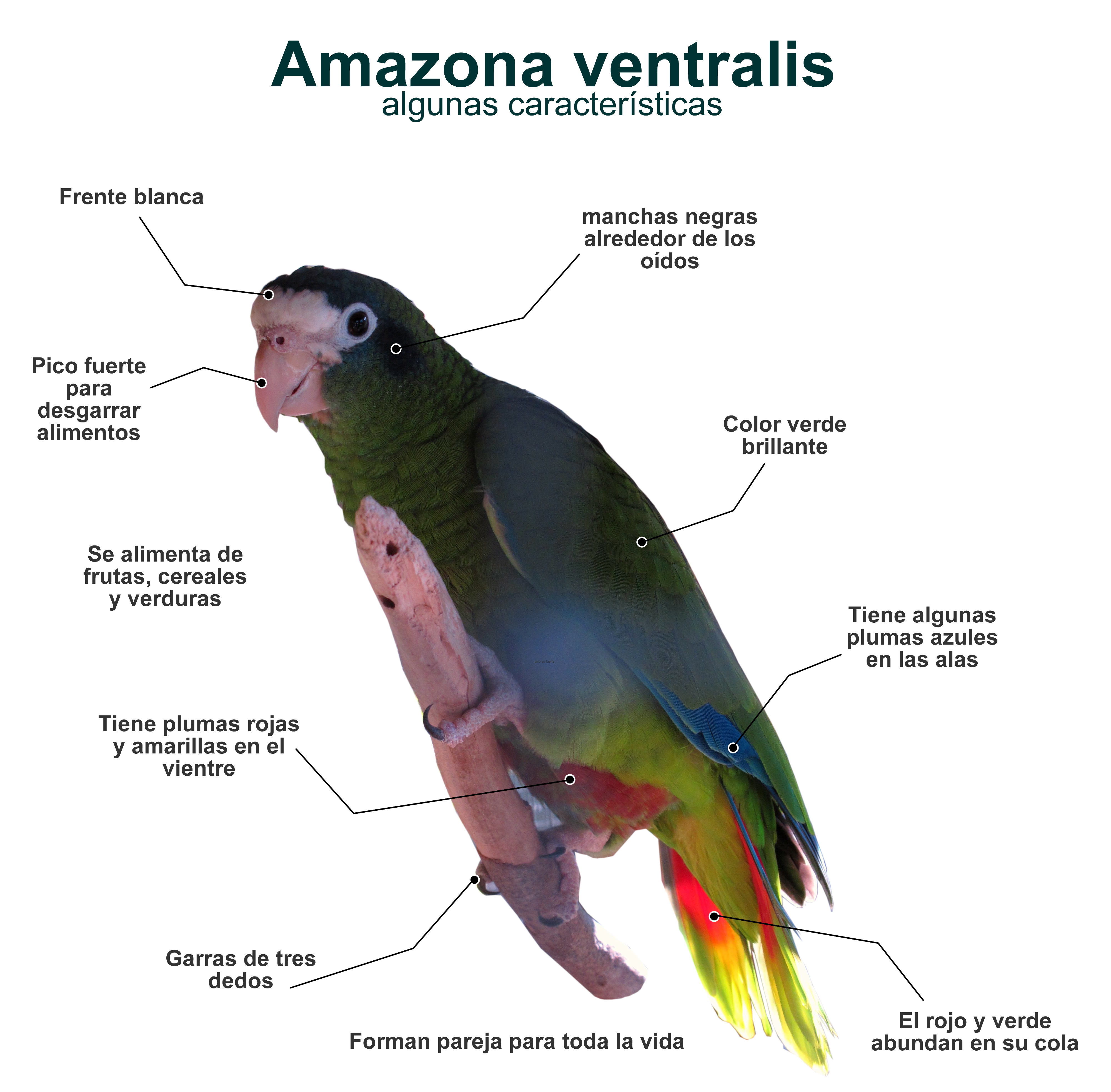 Infografía de ave Amazona ventralis